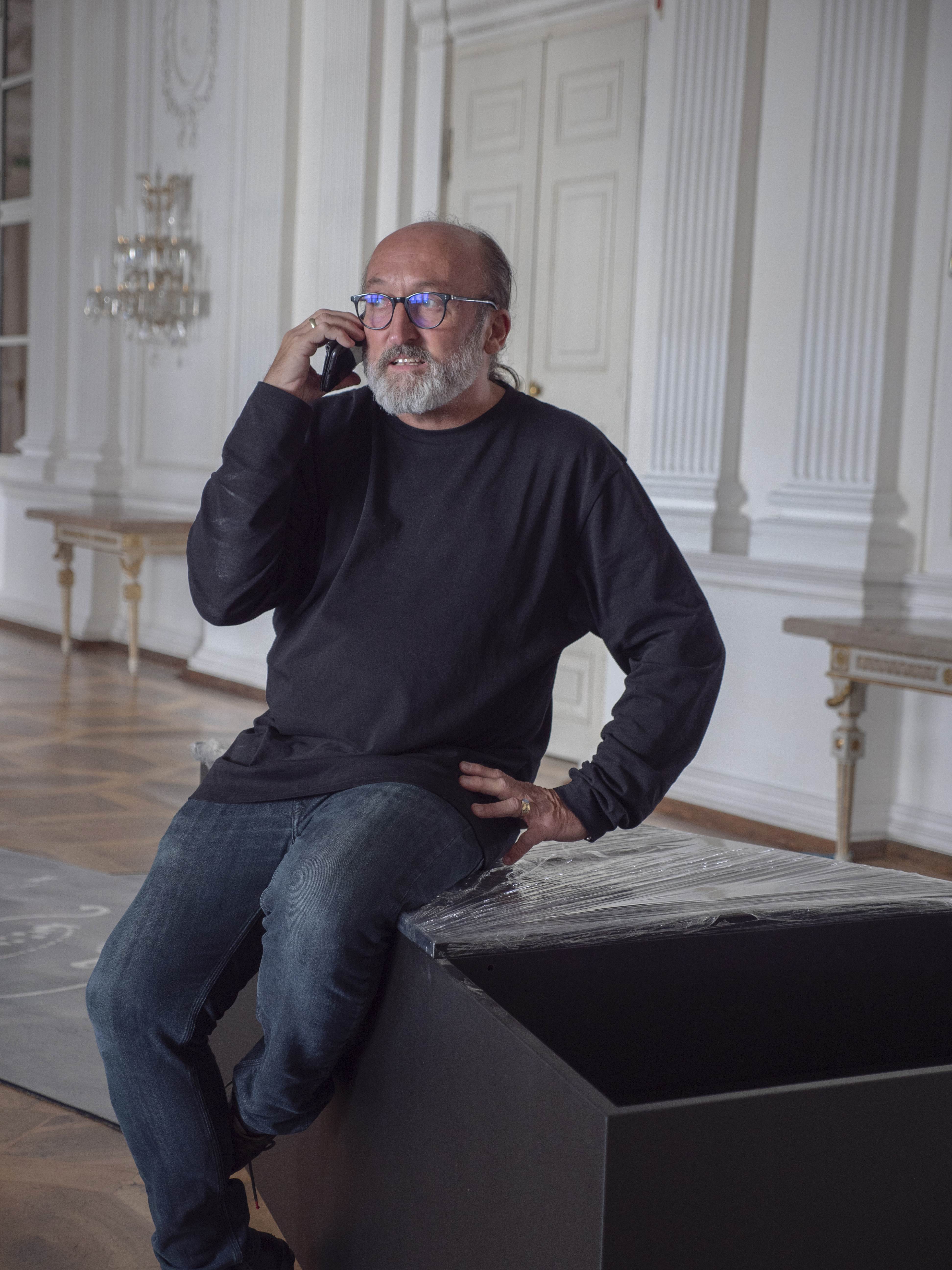 @work